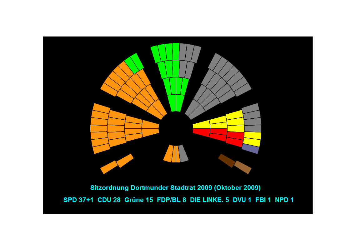 Sitzordnung des Dortmunder Stadtrates 2009 (Stand Oktober 2009)